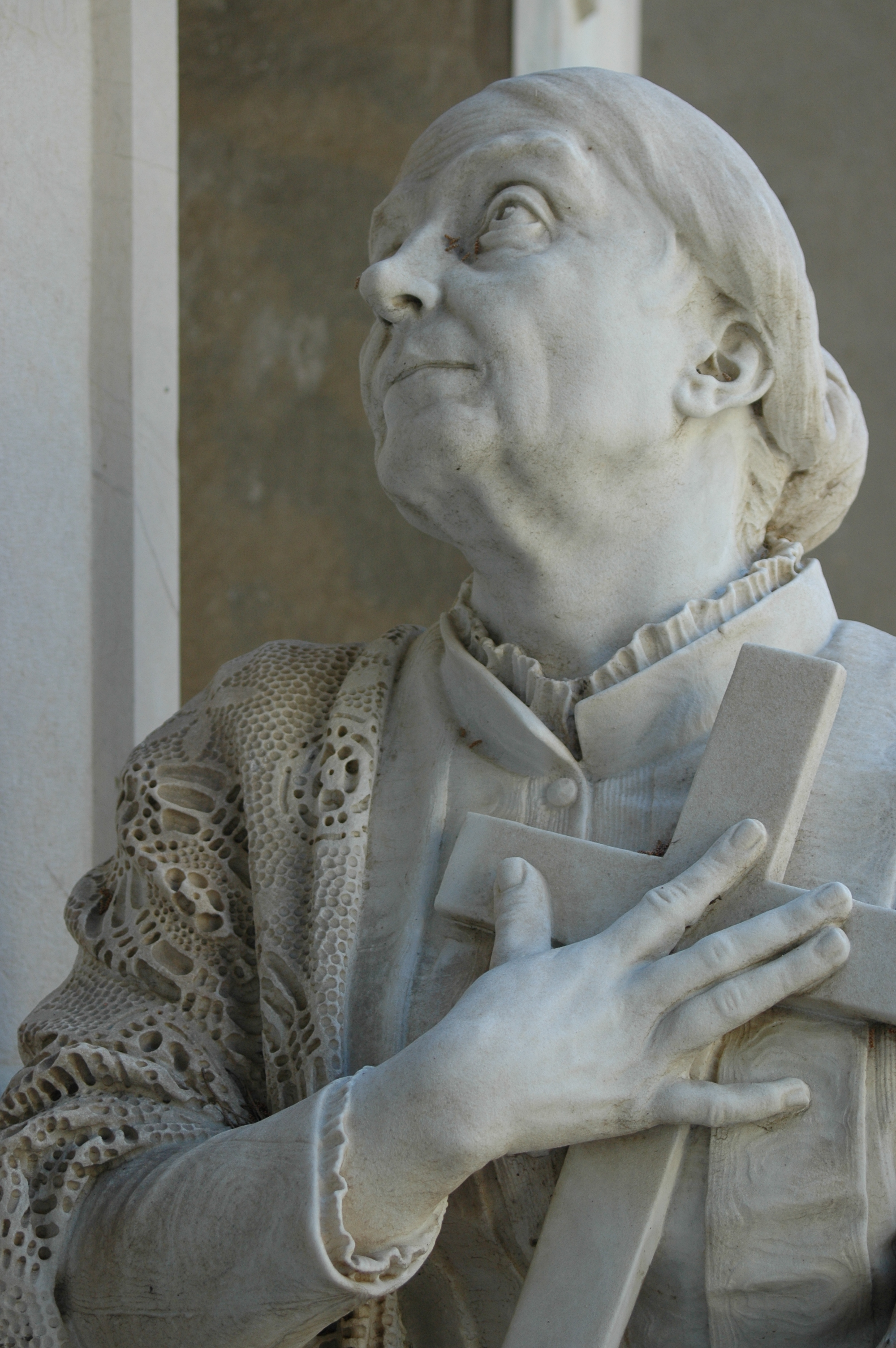 Monumento all'avvocato Giuseppe Todde, scultore Giuseppe Sartorio (1897) - Cimitero di Bonaria, Cagliari